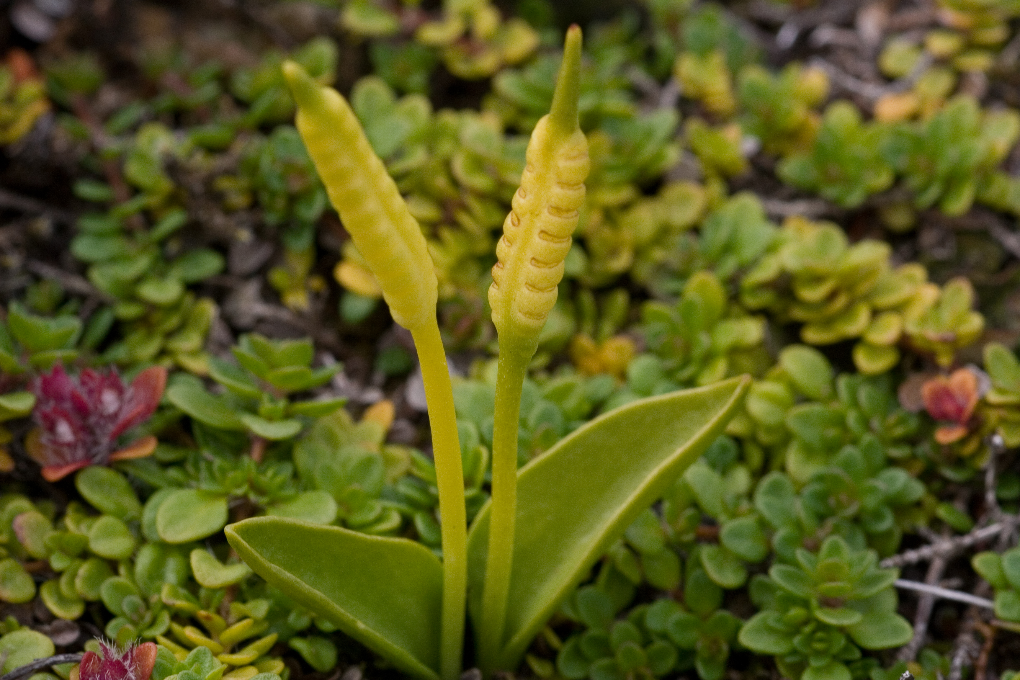 Späd ormtunga - Ophioglossum azoricum